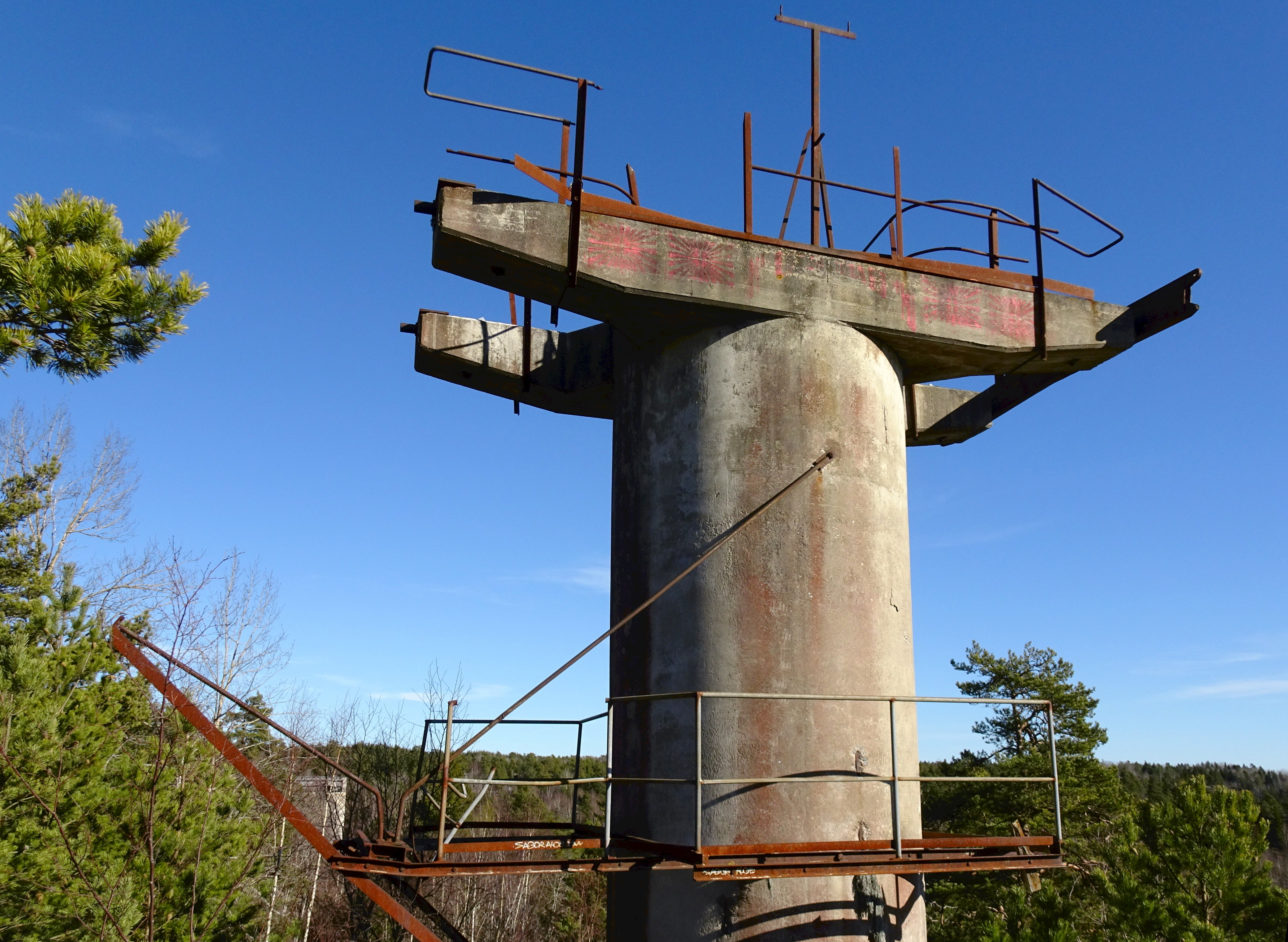 Stora Vika cementfabrik, linbana